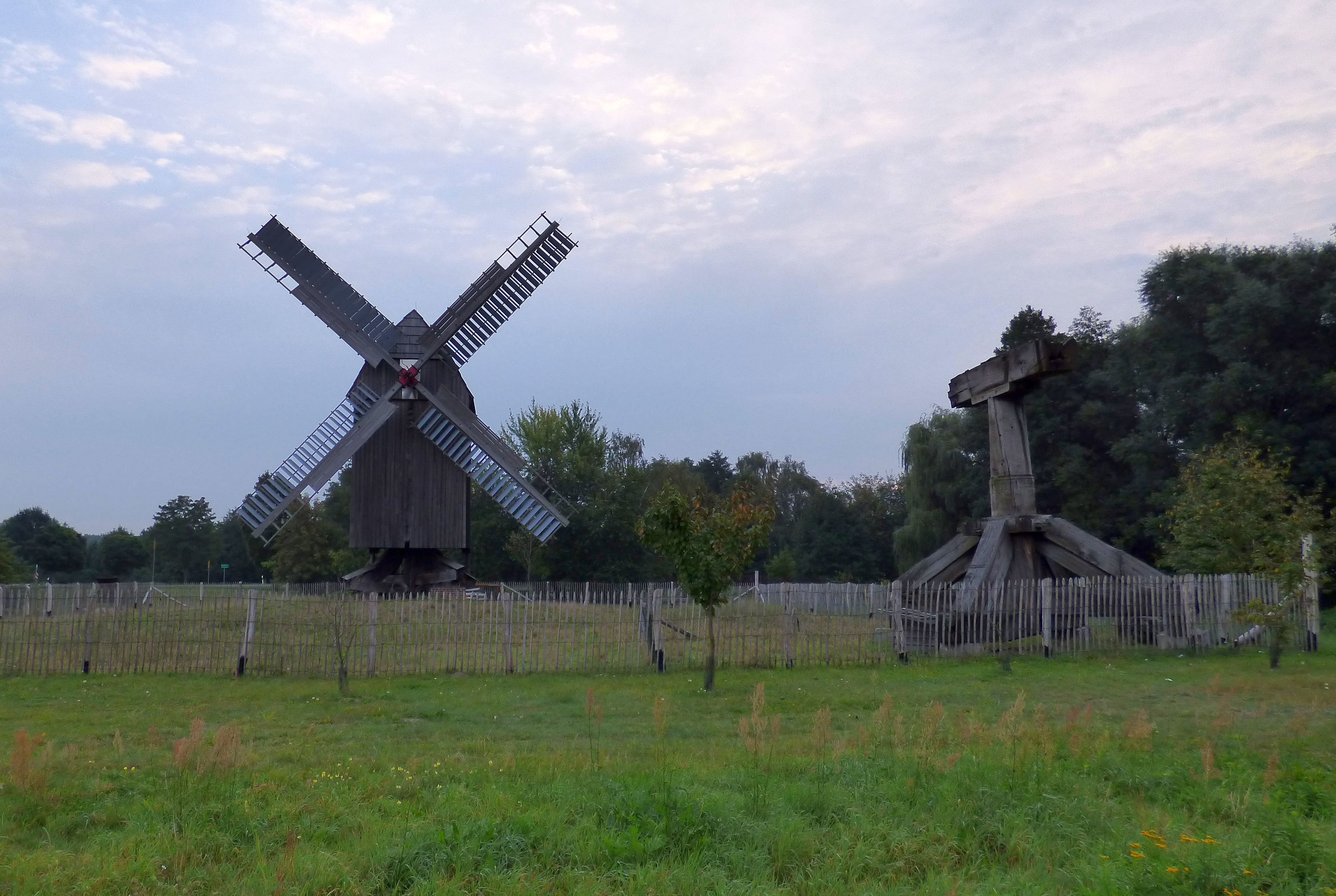 Bockwindmühle in Bad Düben, Sachsen, Deutschland, errichtet ursprünglich 1840, 2005/2006 Restauration